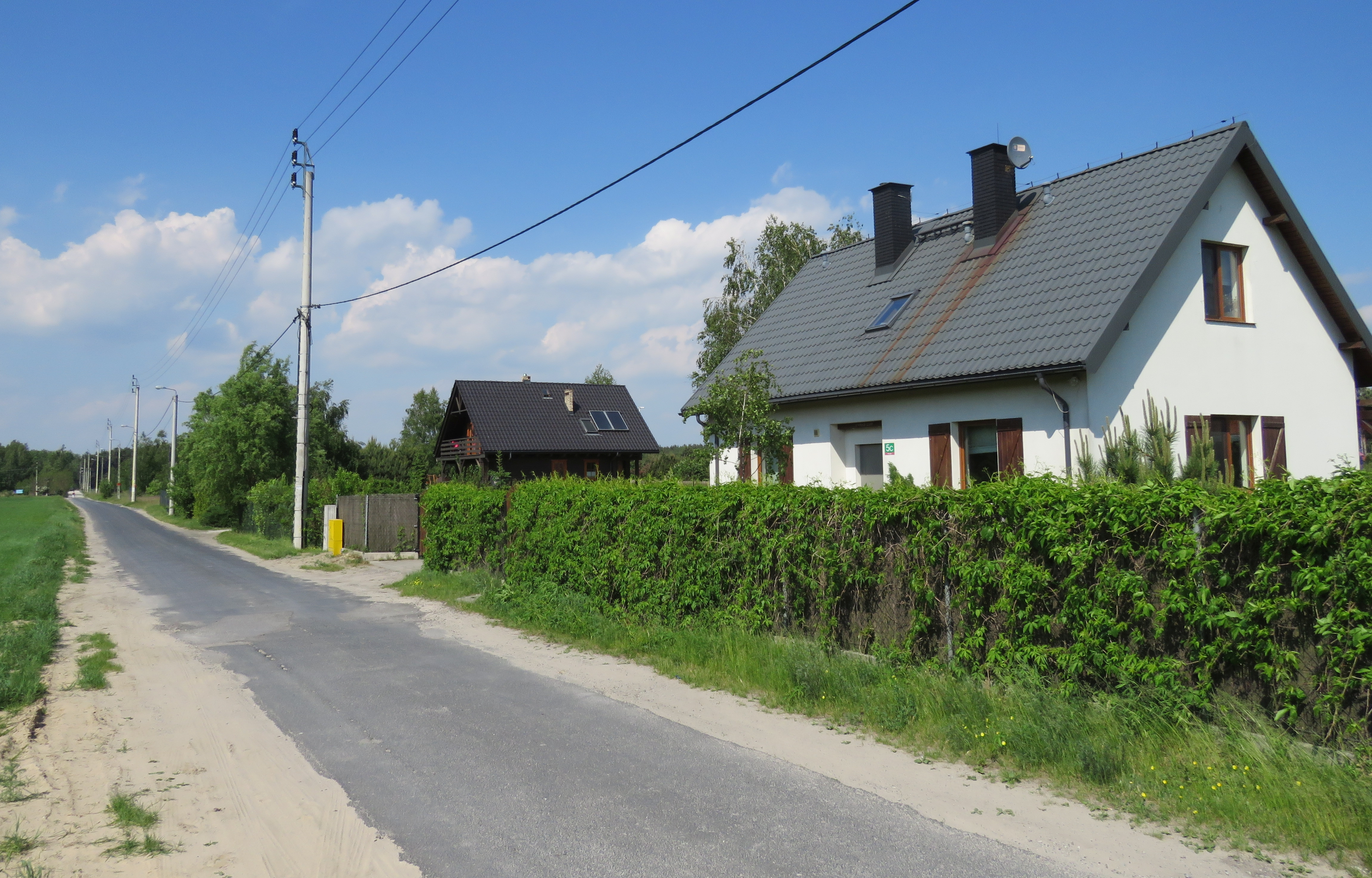 Powązki gmina Leszno